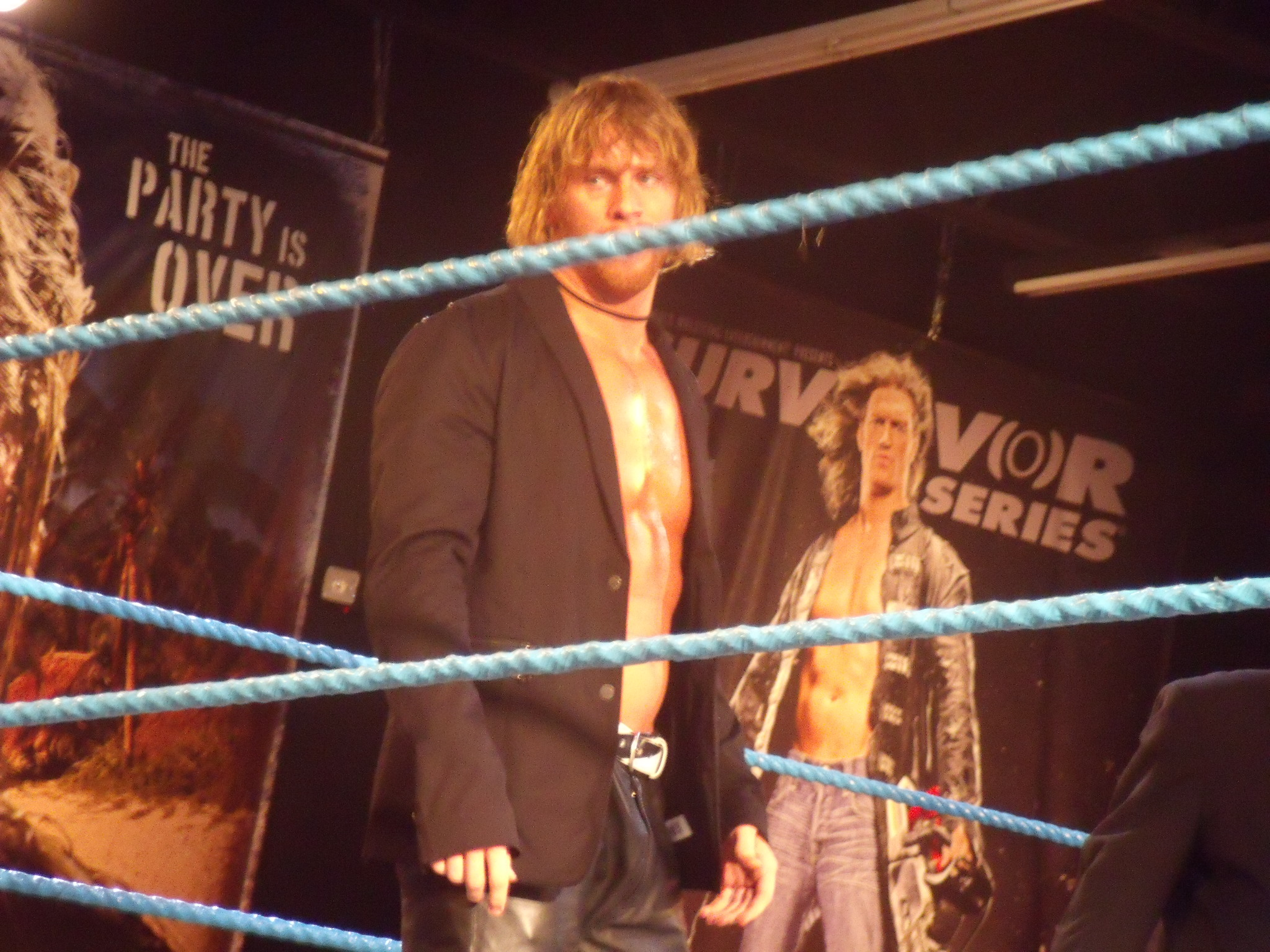 FCW 9/24/09.